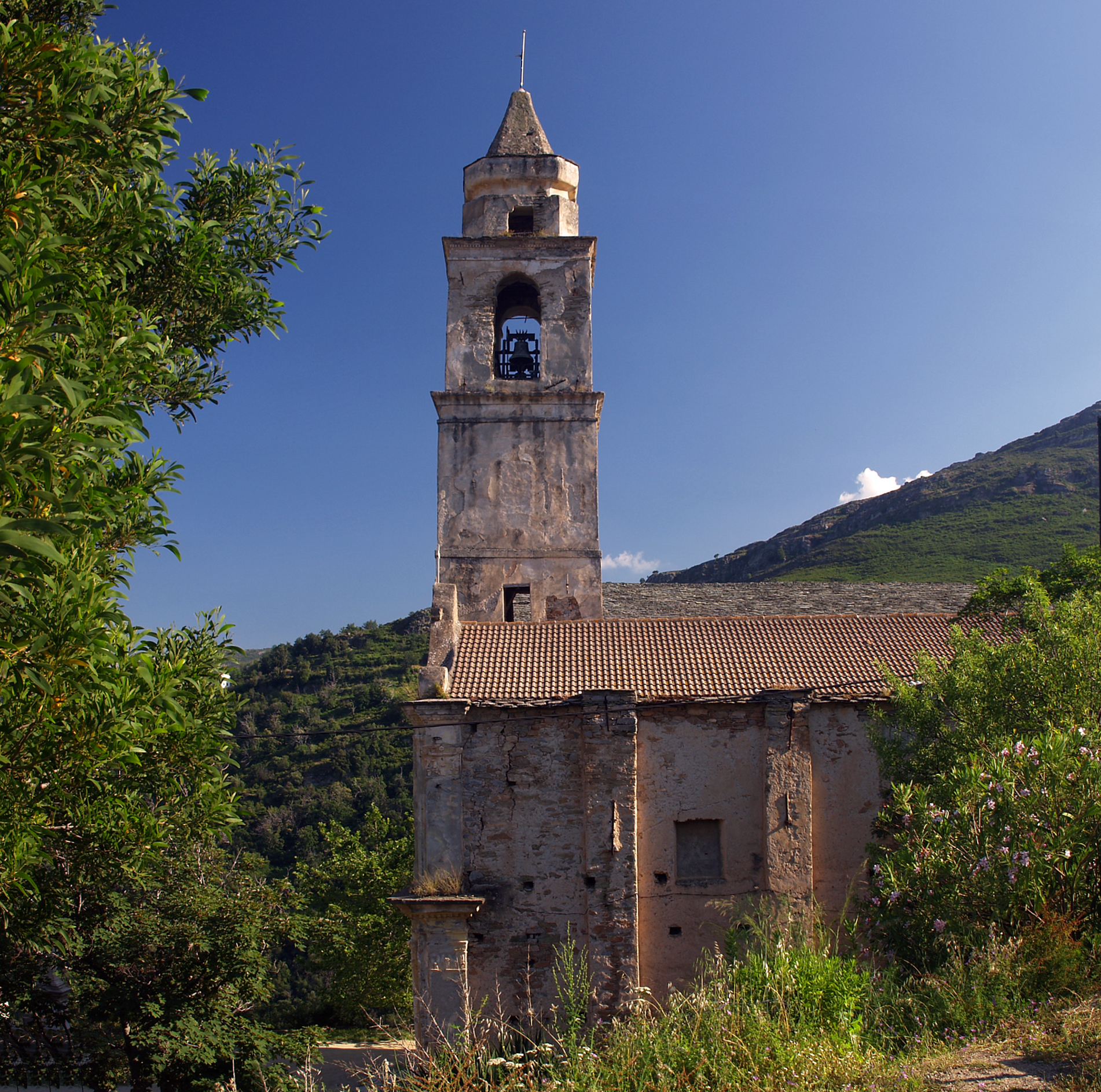 Santo-Pietro-di-Tenda (Corsica) - Eglise San Giovanni Evangelista et oratoire Santa Croce